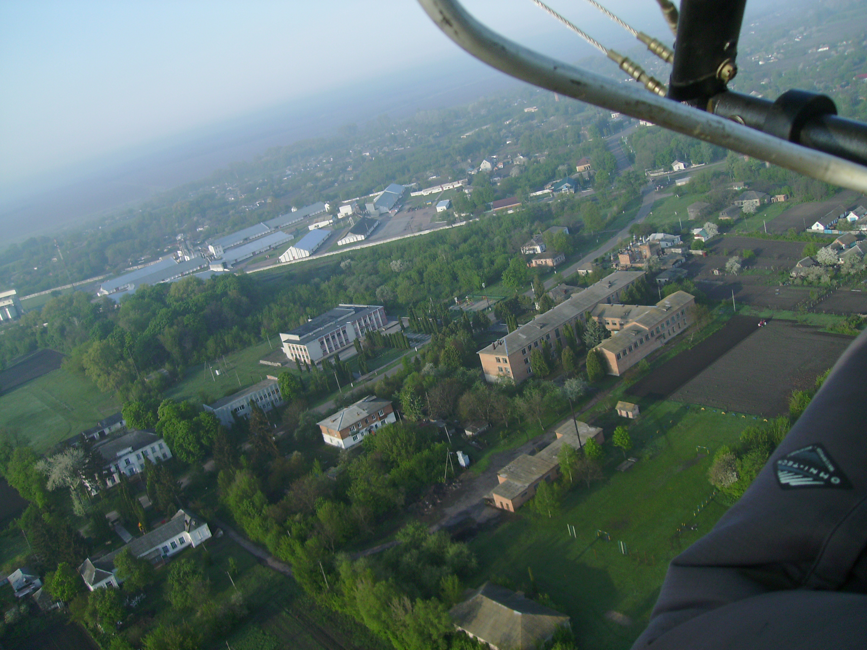 Дмитрівська школа, клуб. Знімок 05.05.2020 р. Мотодельтаплан, Балашов С.